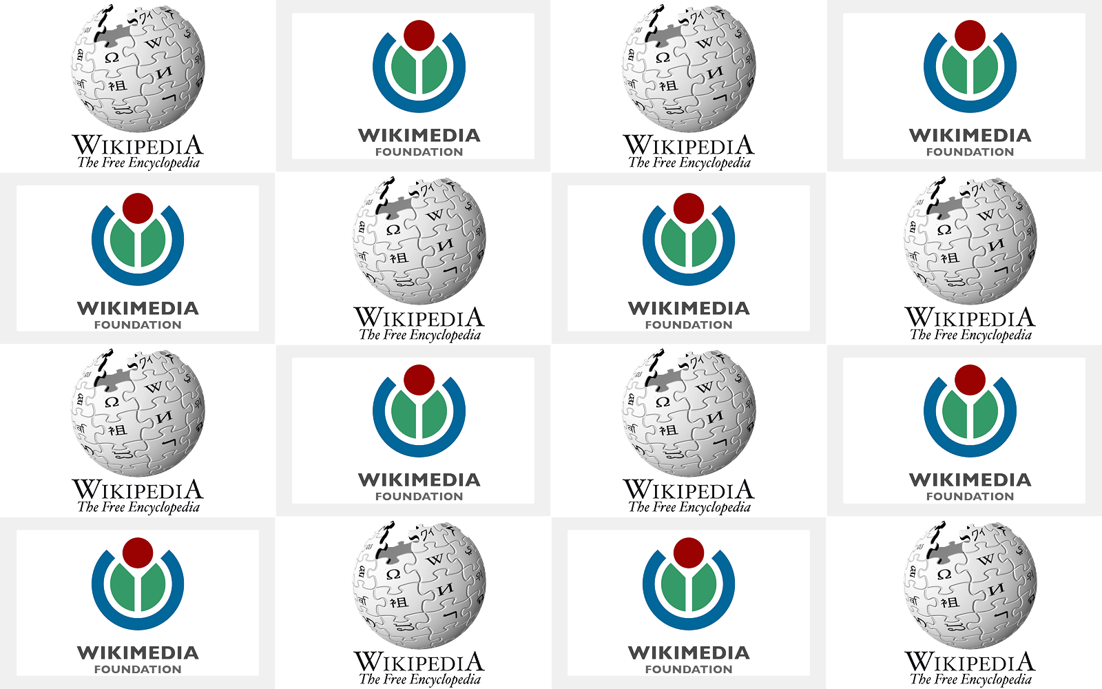 インタビューボード図柄のサンプル(ウィキペディア・ウィキメディア財団ロゴ使用)